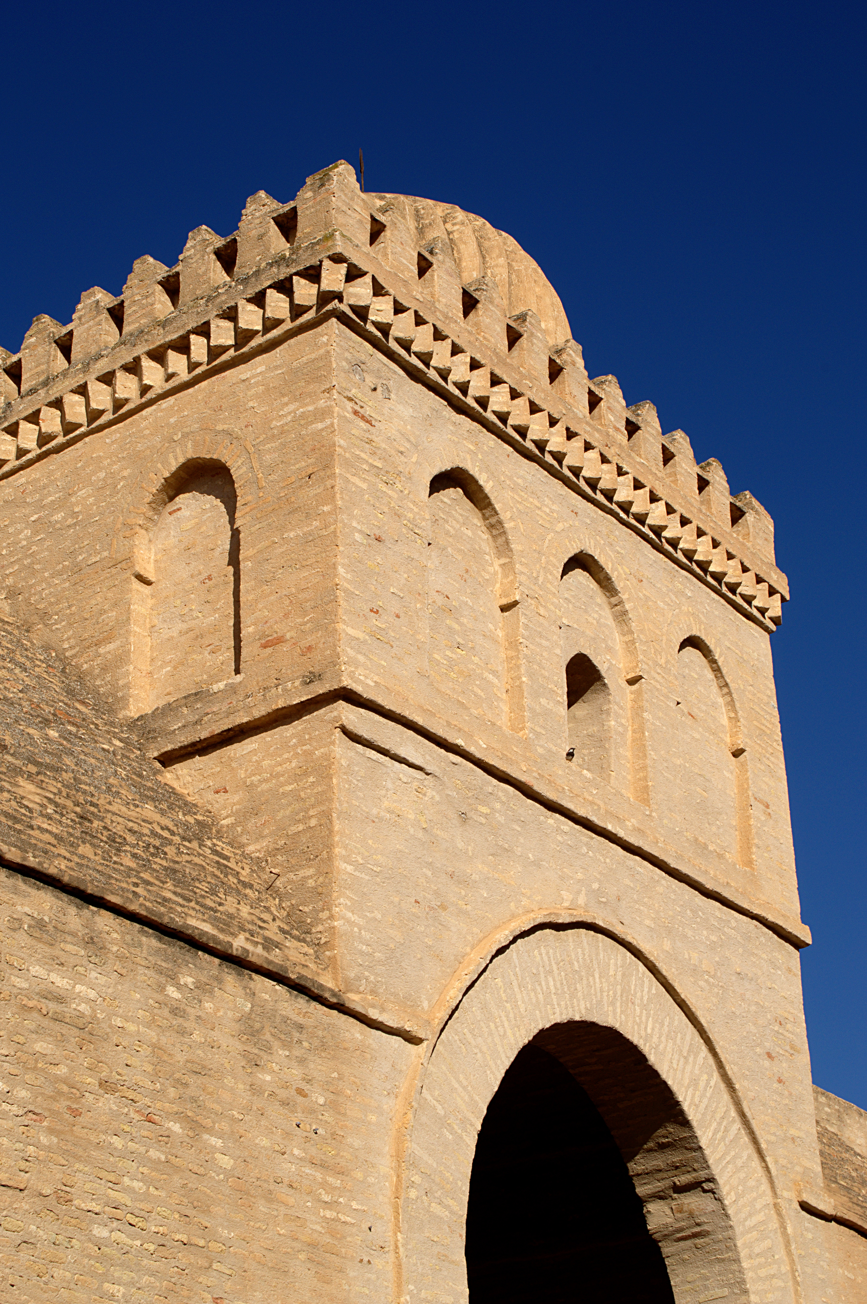 Grande Mosquée (Sidi Okba), Kairouan. La photographie montre la partie supérieure de l'un des porches de la façade occidentale.